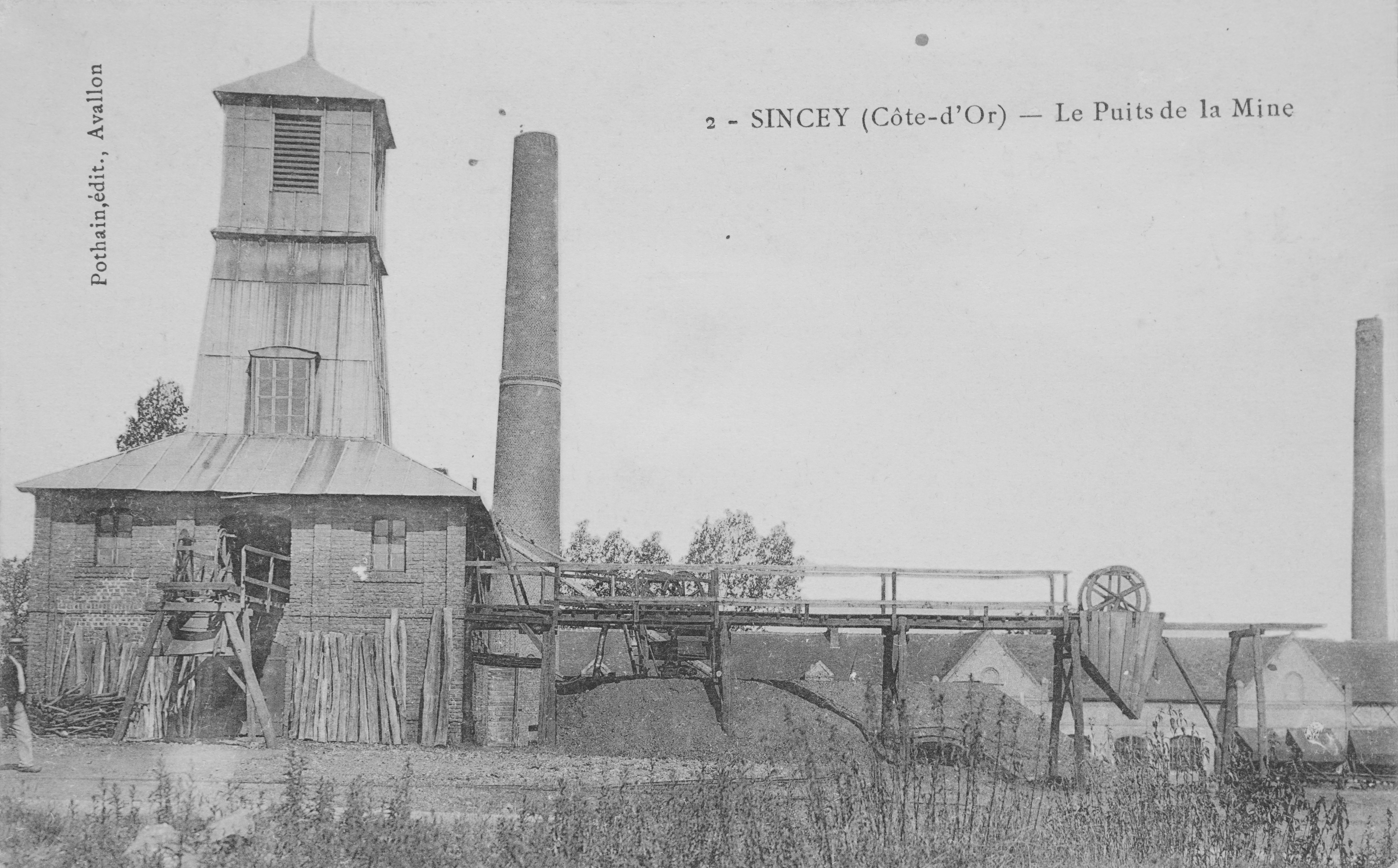 Le puits de mine de charbon de Sincey-lès-Rouvray.